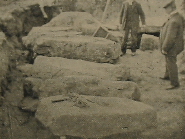 Nrf: D'la Vielle Chronique, Jèrri